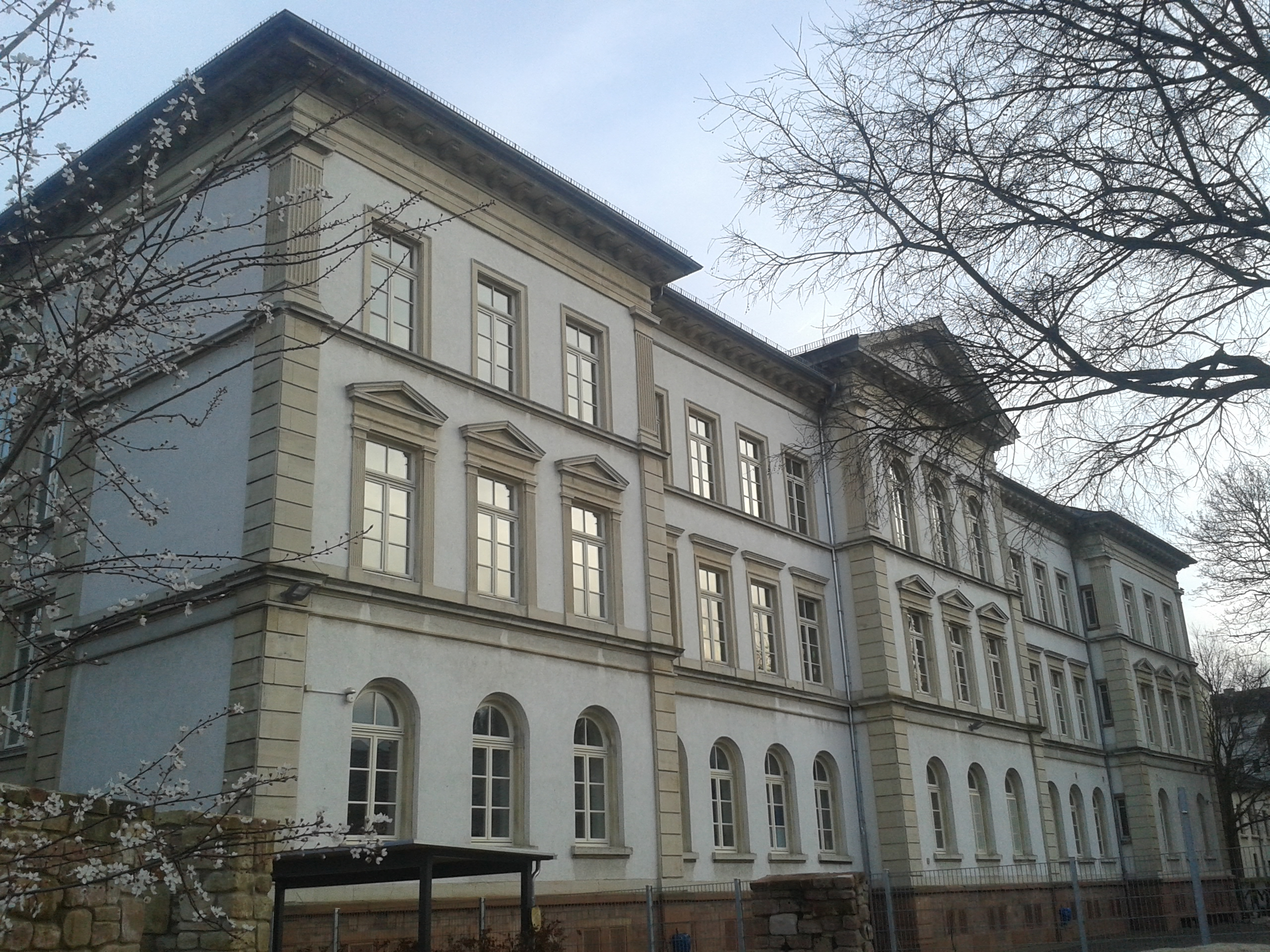 Rückseite der Karmeliter Grundschule in Worms